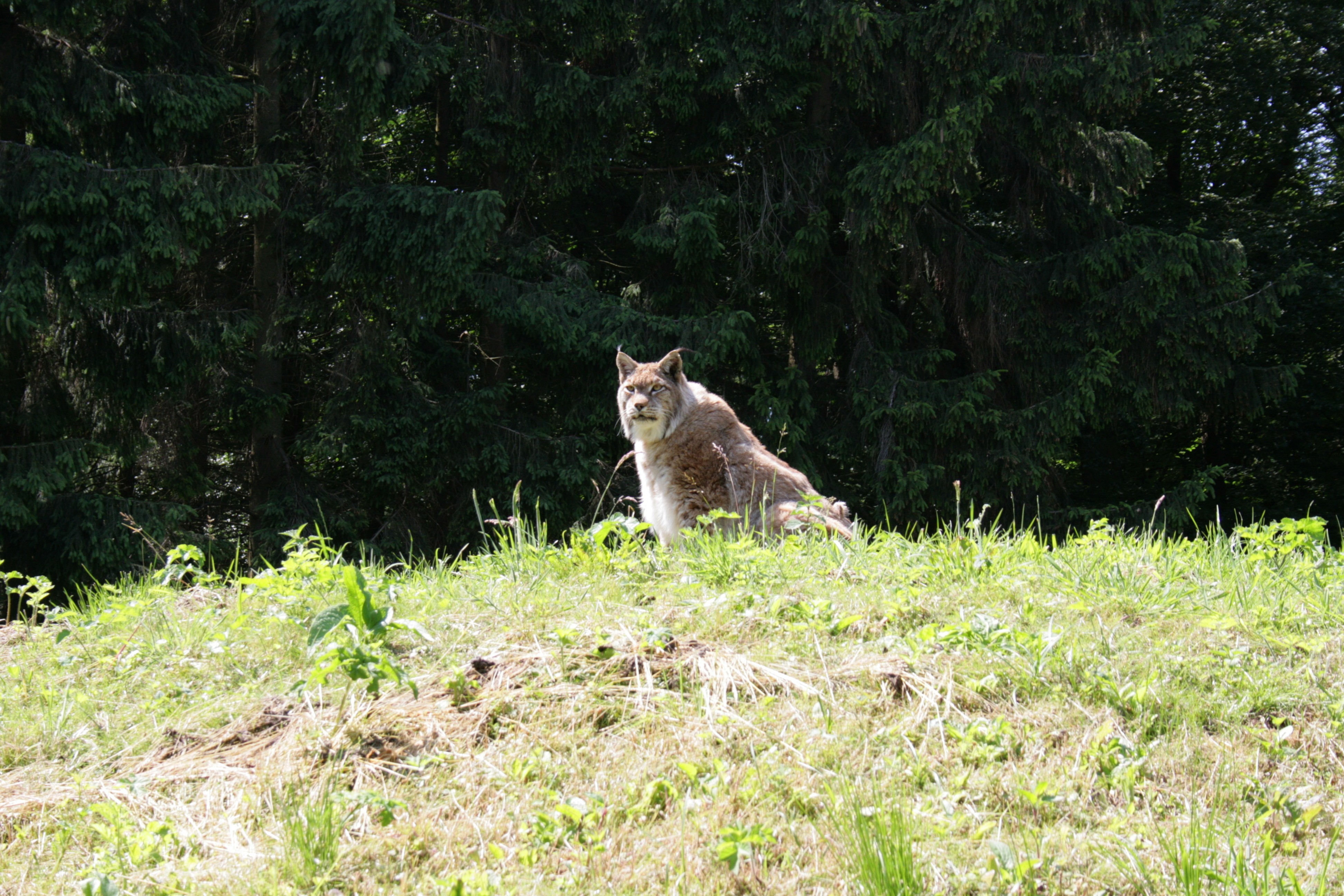 Anholter Schweiz in Anholt, Isselburg